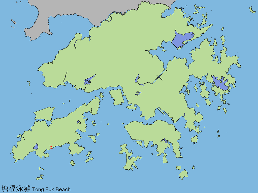 中文（香港）: 塘福泳灘位置圖，紅色地方為塘福泳灘位置。